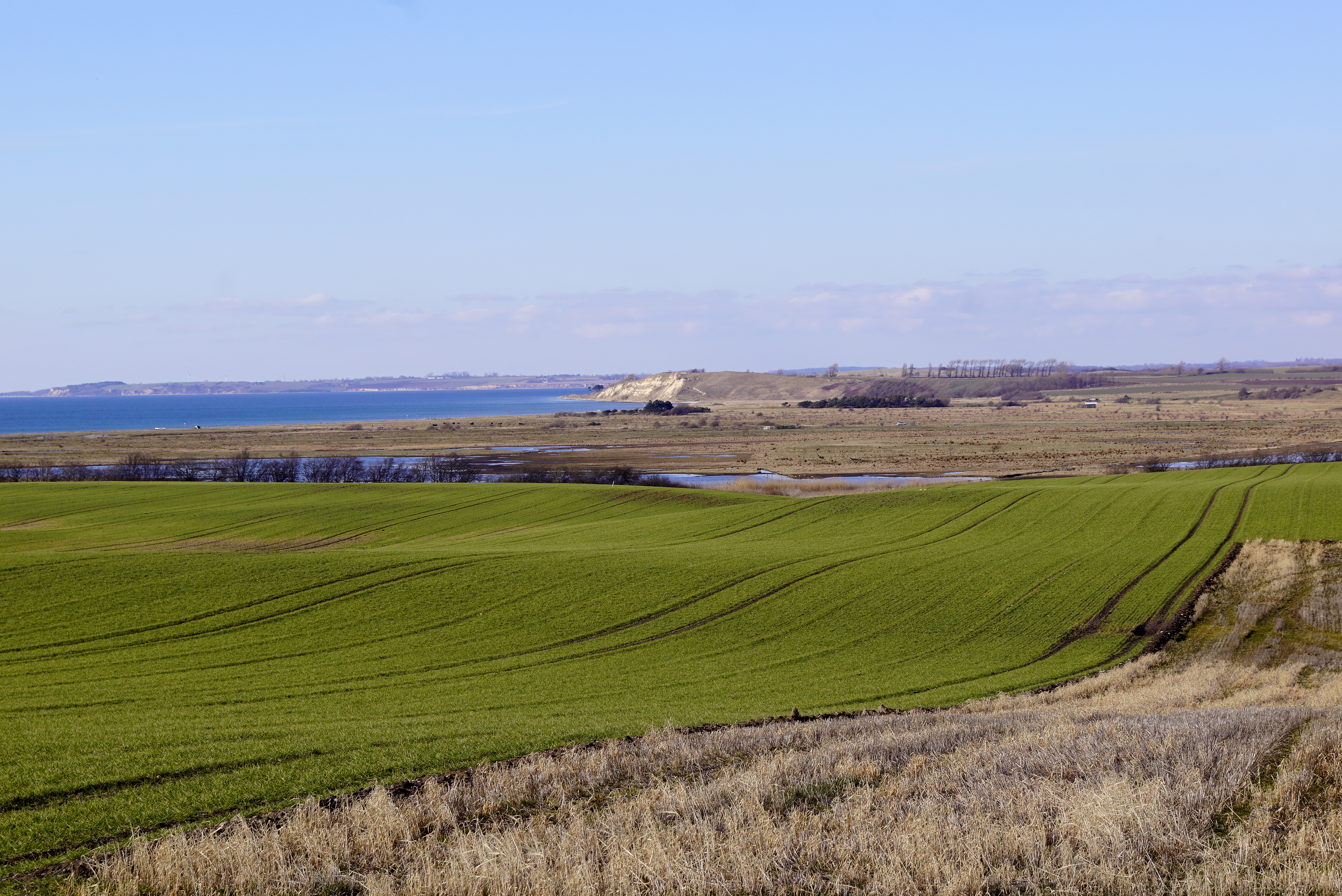 Maden på Helnæs set fra syd